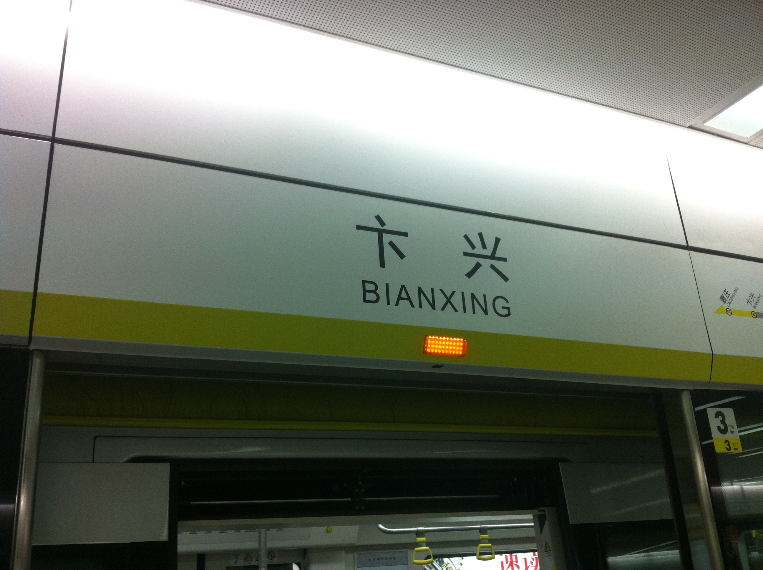 中文（中国大陆）: 天津地铁二号线卞兴站